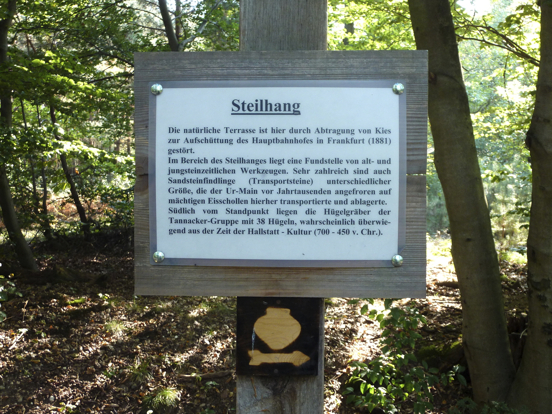 Frankfurt am Main, Stadtwald: Entlang der Kelsterbacher Terrasse, Abbruchkante des Main-Urstromtals aus dem Pliozän, verläuft an deren Oberkante die Grenzschneise. Diese ist ein Abschnitt einer Altstraße zwischen Mainz und Frankfurt. Das Foto zeigt eine Infotafel zu einem Teil des Steilhangs der Kelsterbacher Terrasse.